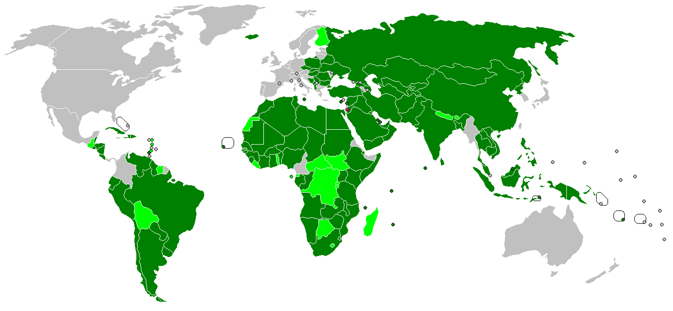 Держави, що визнали Палестину